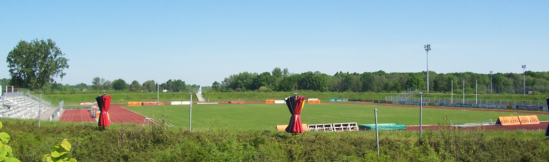 Sportzentrum in Eilenburg